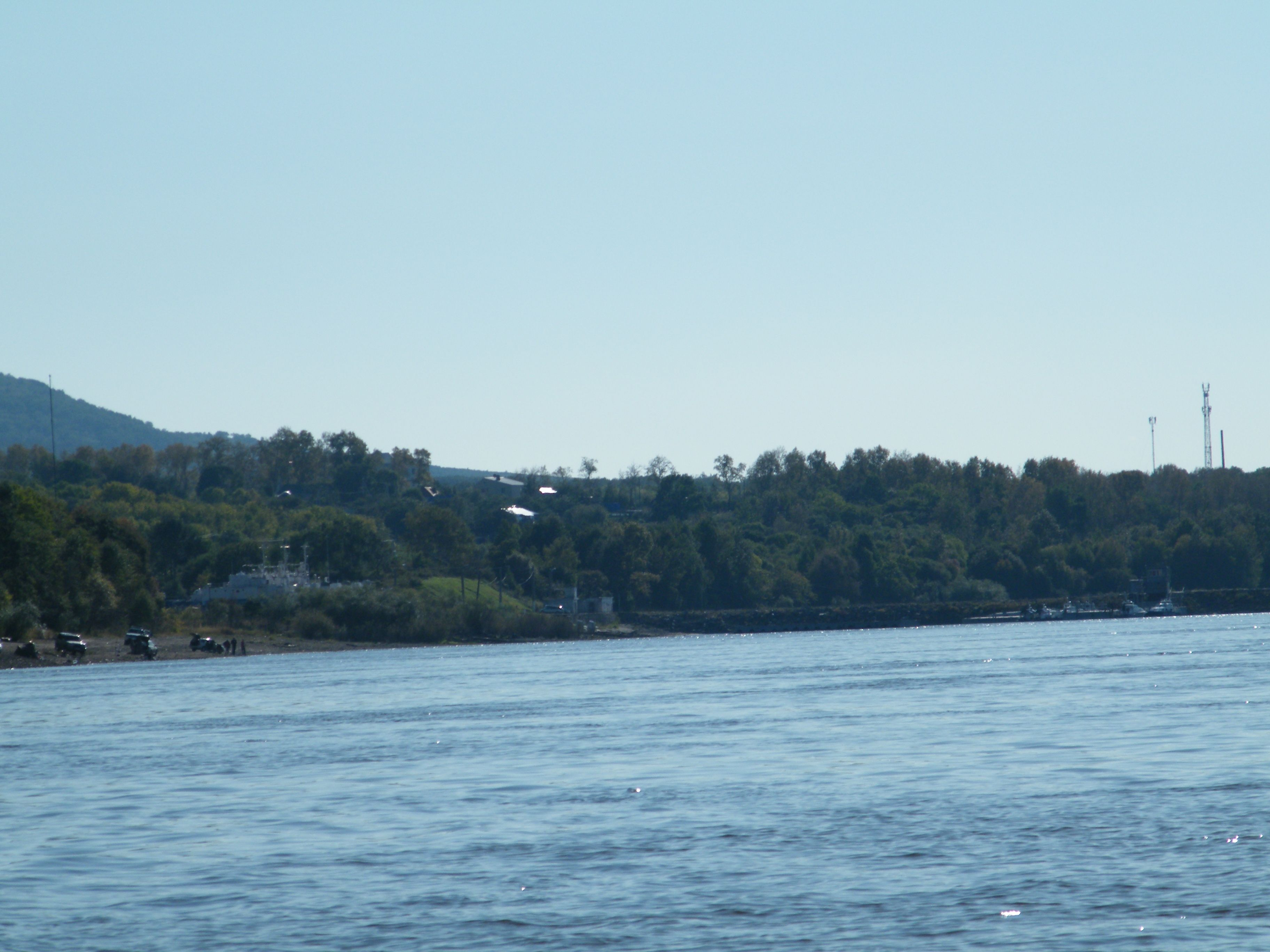 Амурская протока и село Казакевичево сент 2014